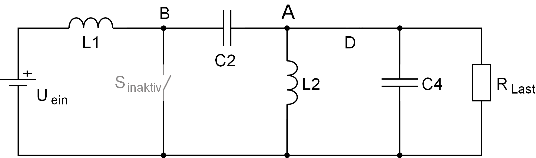 Ersatzschaltbild fuer den zweiten Zeitabschnitt